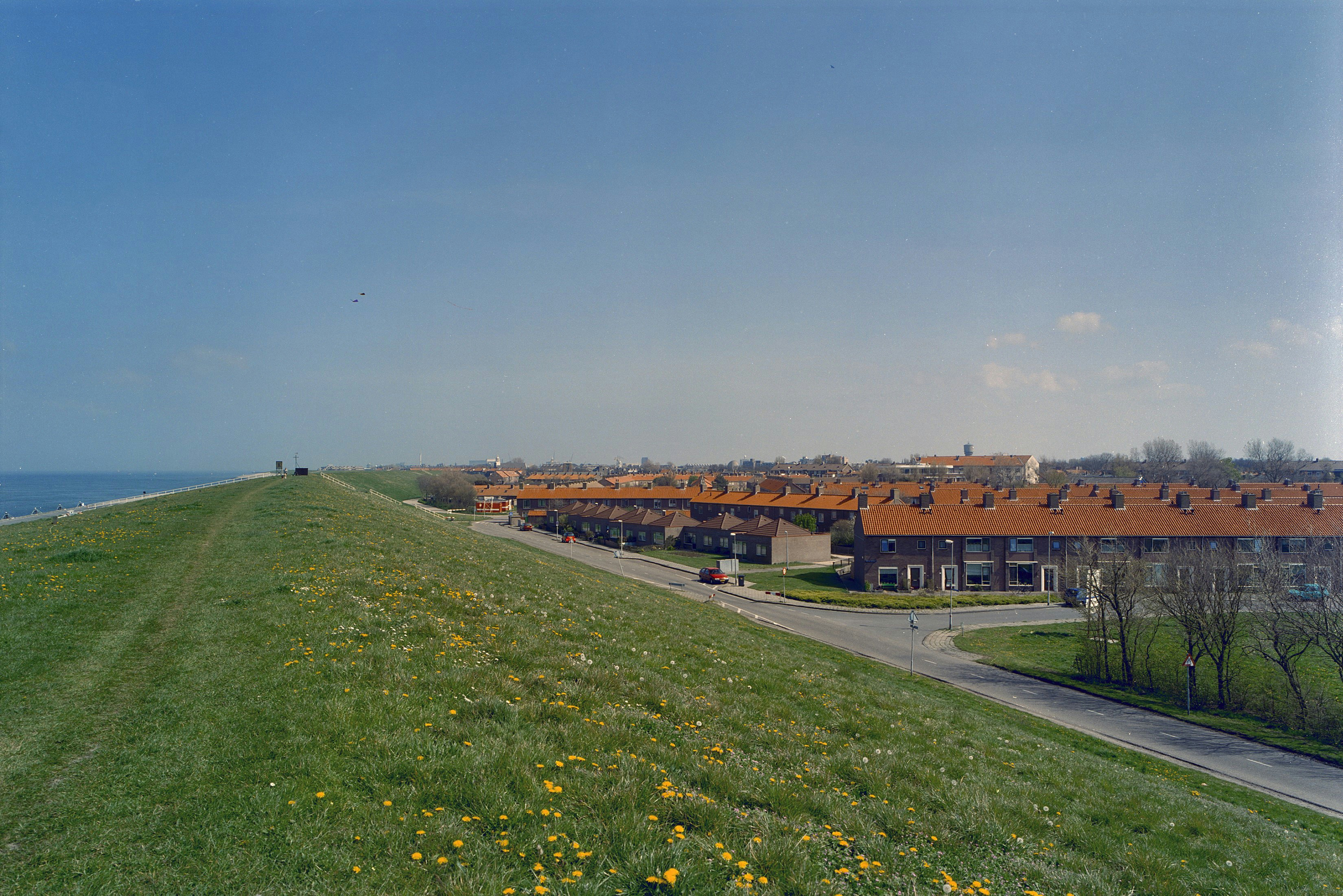 Oud Den Helder: Gezicht vanaf de dijk (opmerking: Gefotografeerd voor Toonbeelden van de Wederopbouw)